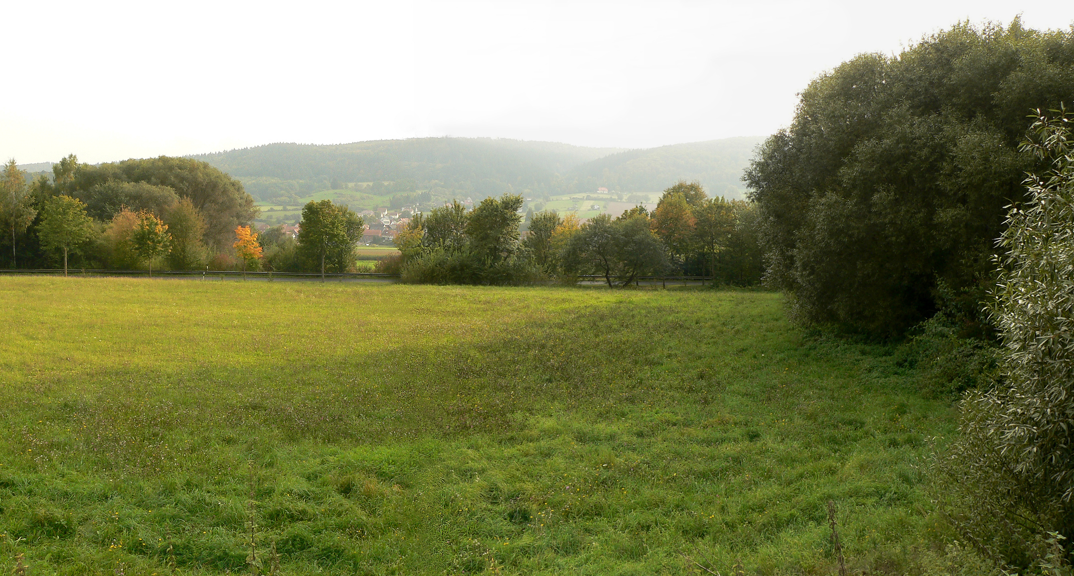 Blick über das Gelände der Wüstung Gardelshausen, vermutlich auch rechts im Wald mit dem Lauf des Rischenbachs